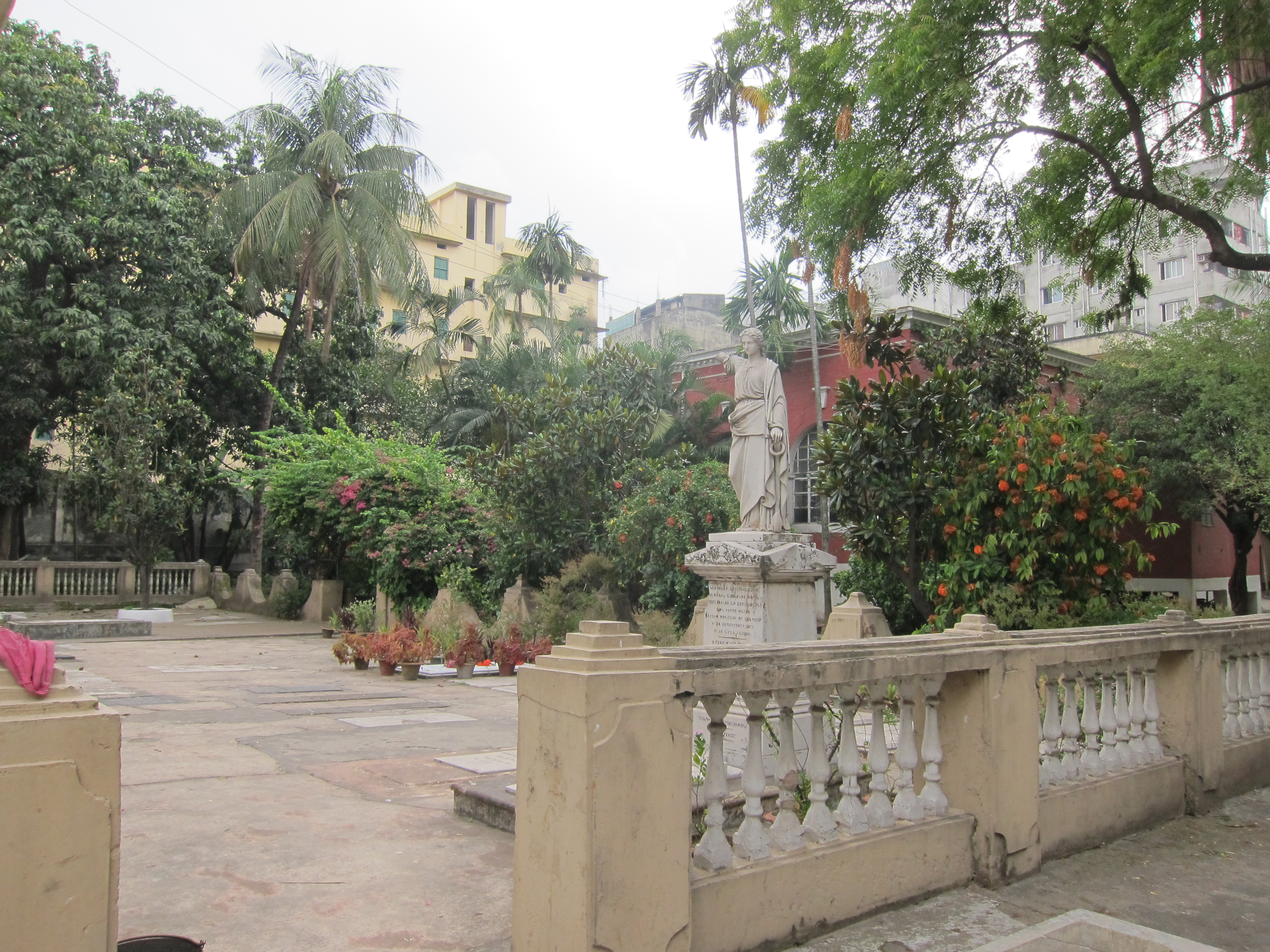 আর্মেনীয় গির্জা